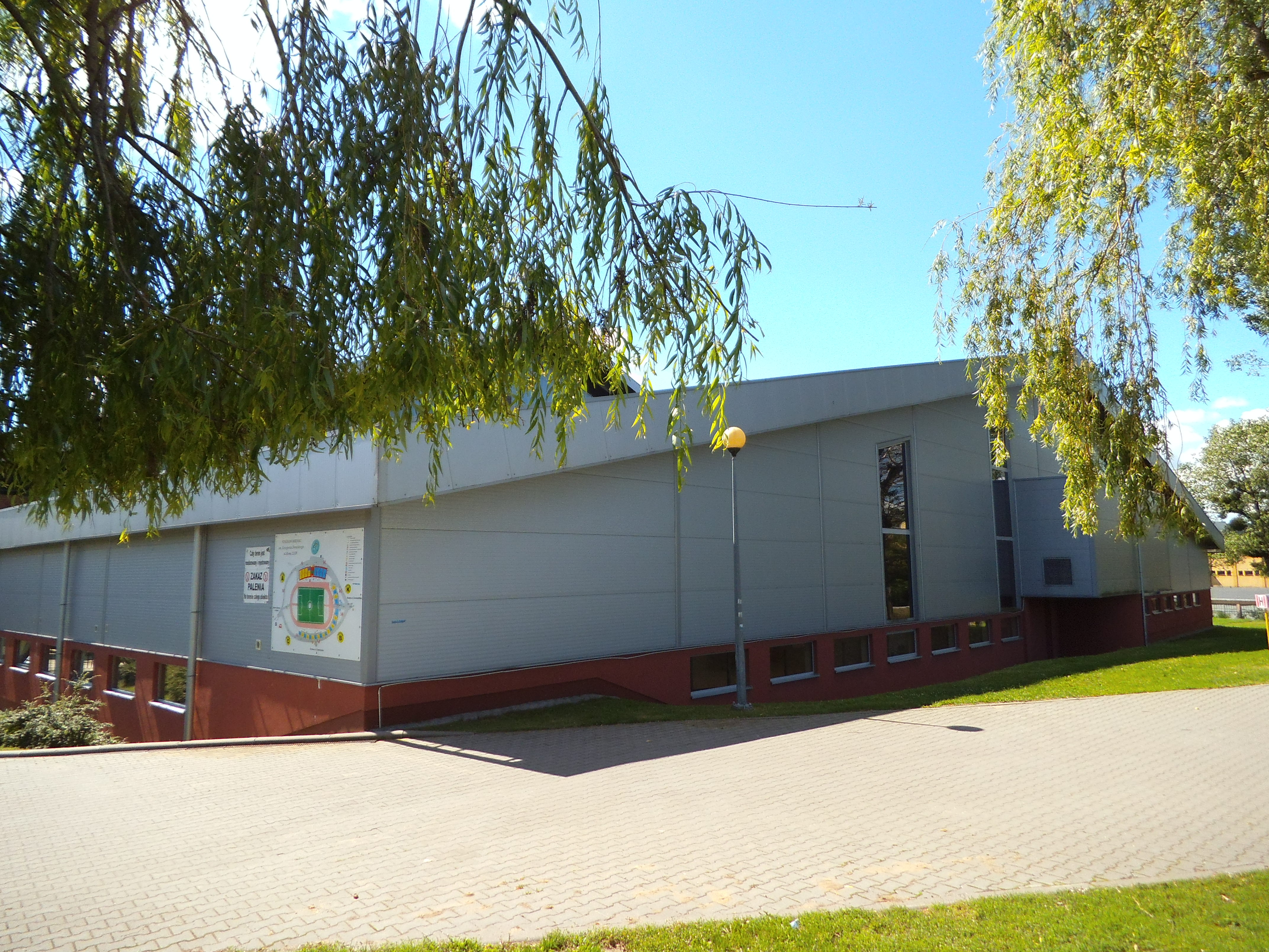 Lodowisko Tor-Tor w Toruniu89